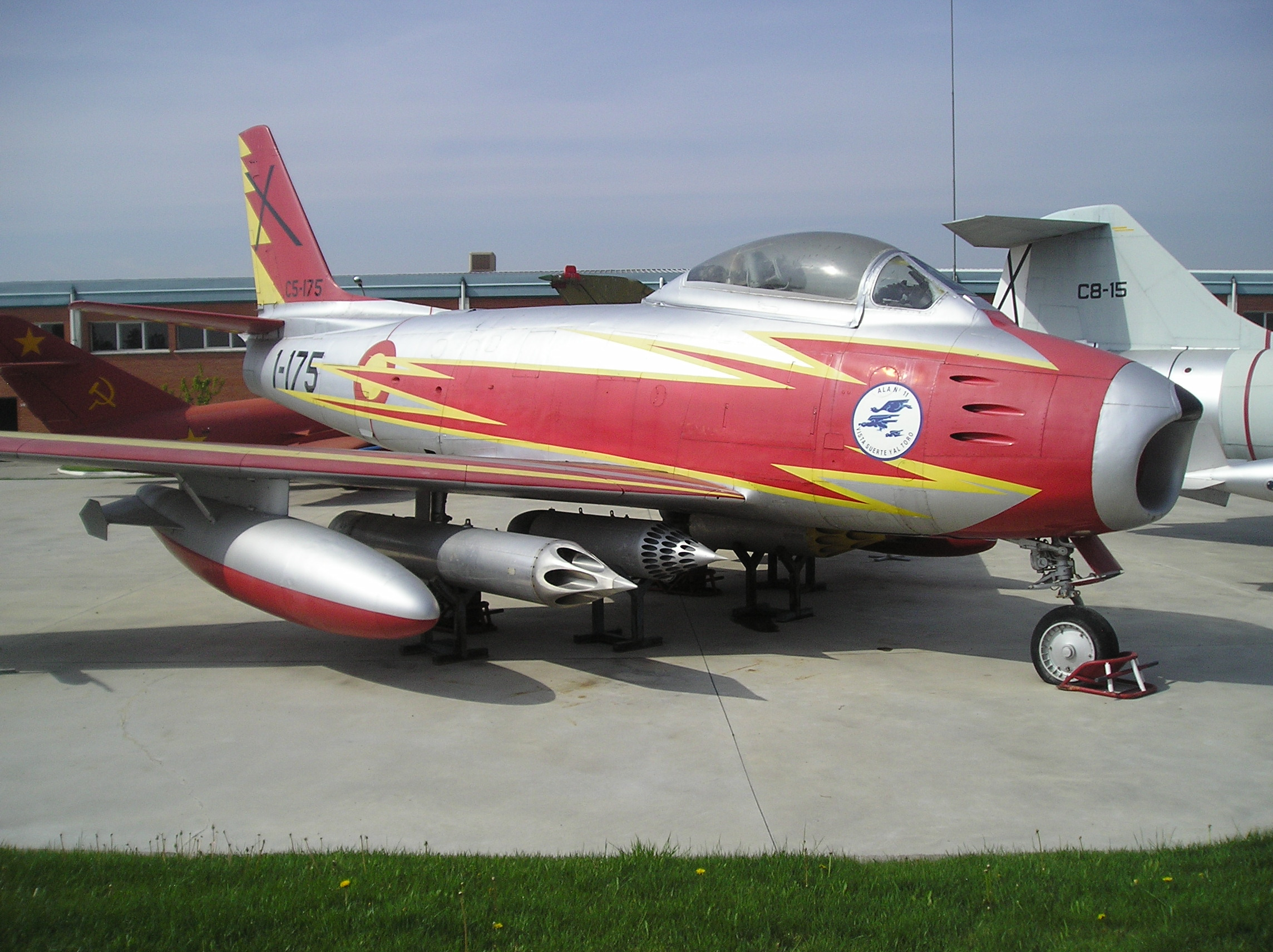 F-86 del Ejercito del Aire Español, Patrulla Ascua, Cuatro Vientos, Madrid (España).